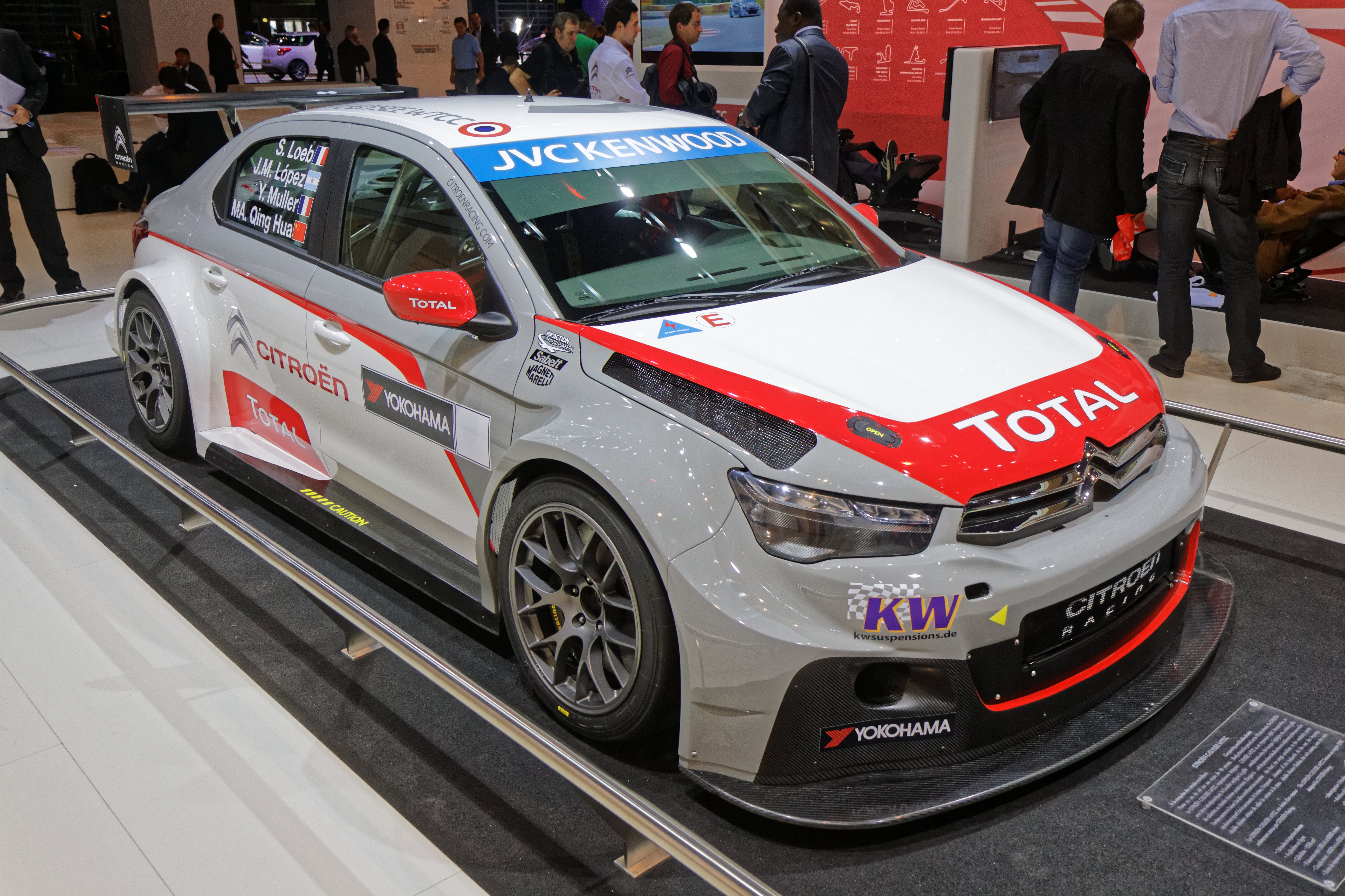 Une Citroën C-Elysée WTCC présentée lors du mondial de l'automobile de Paris 2014.